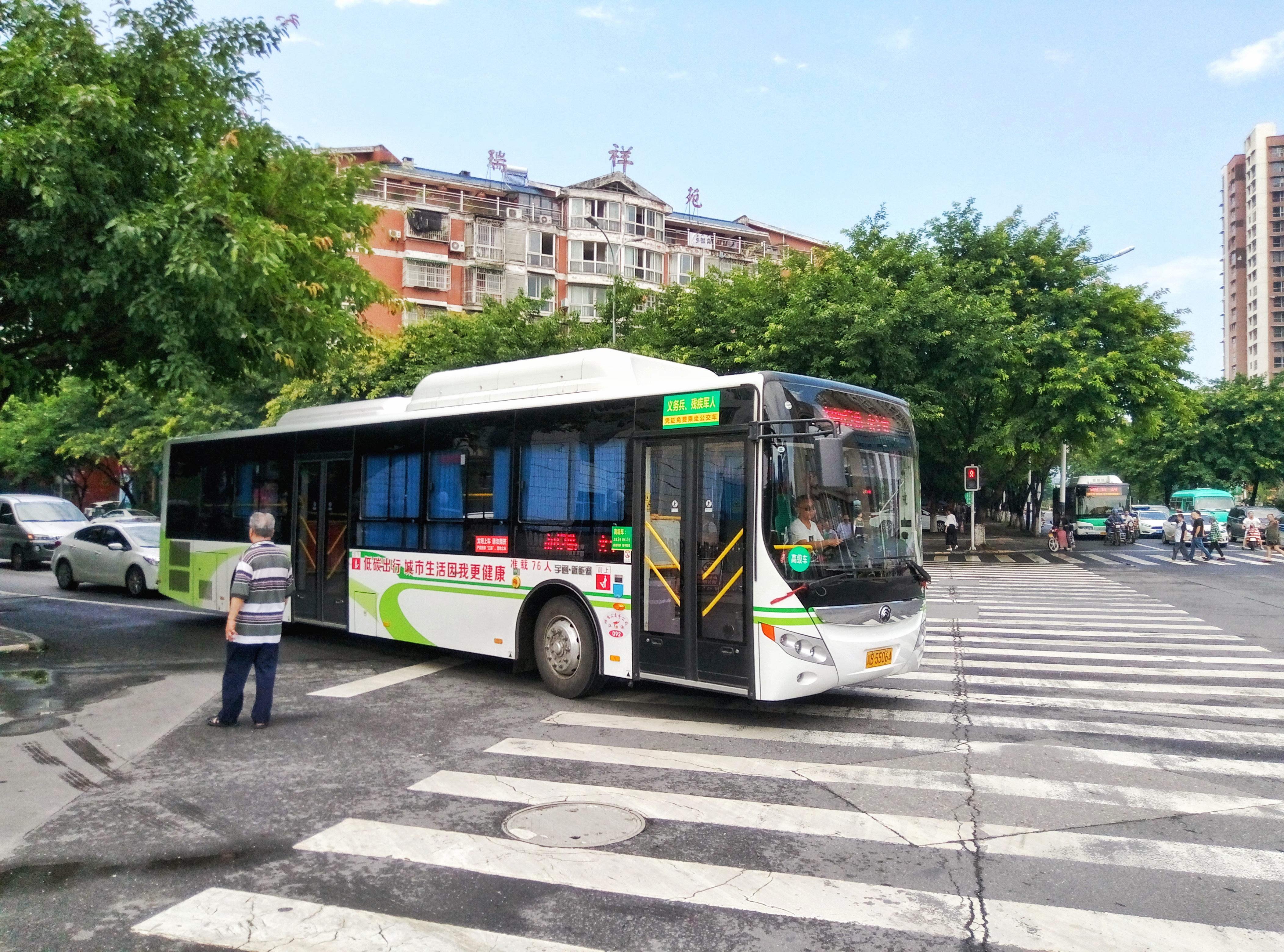 于江油市903医院旁拍摄